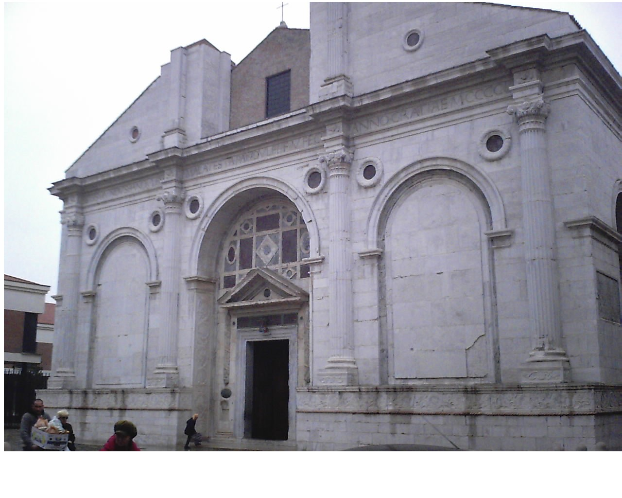 Facciata del Tempio malatestiano a Rimini.